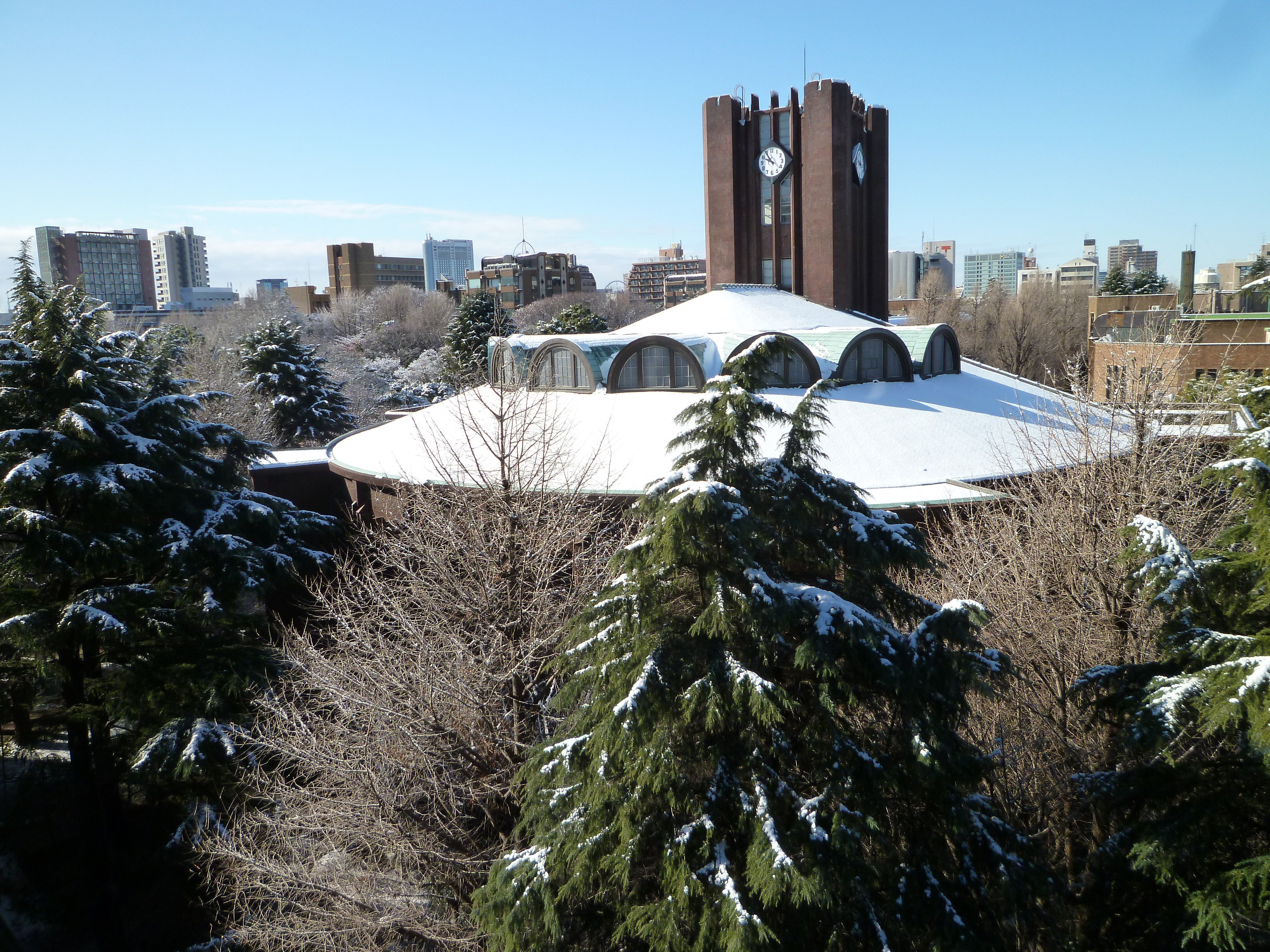 題名に準ずる。